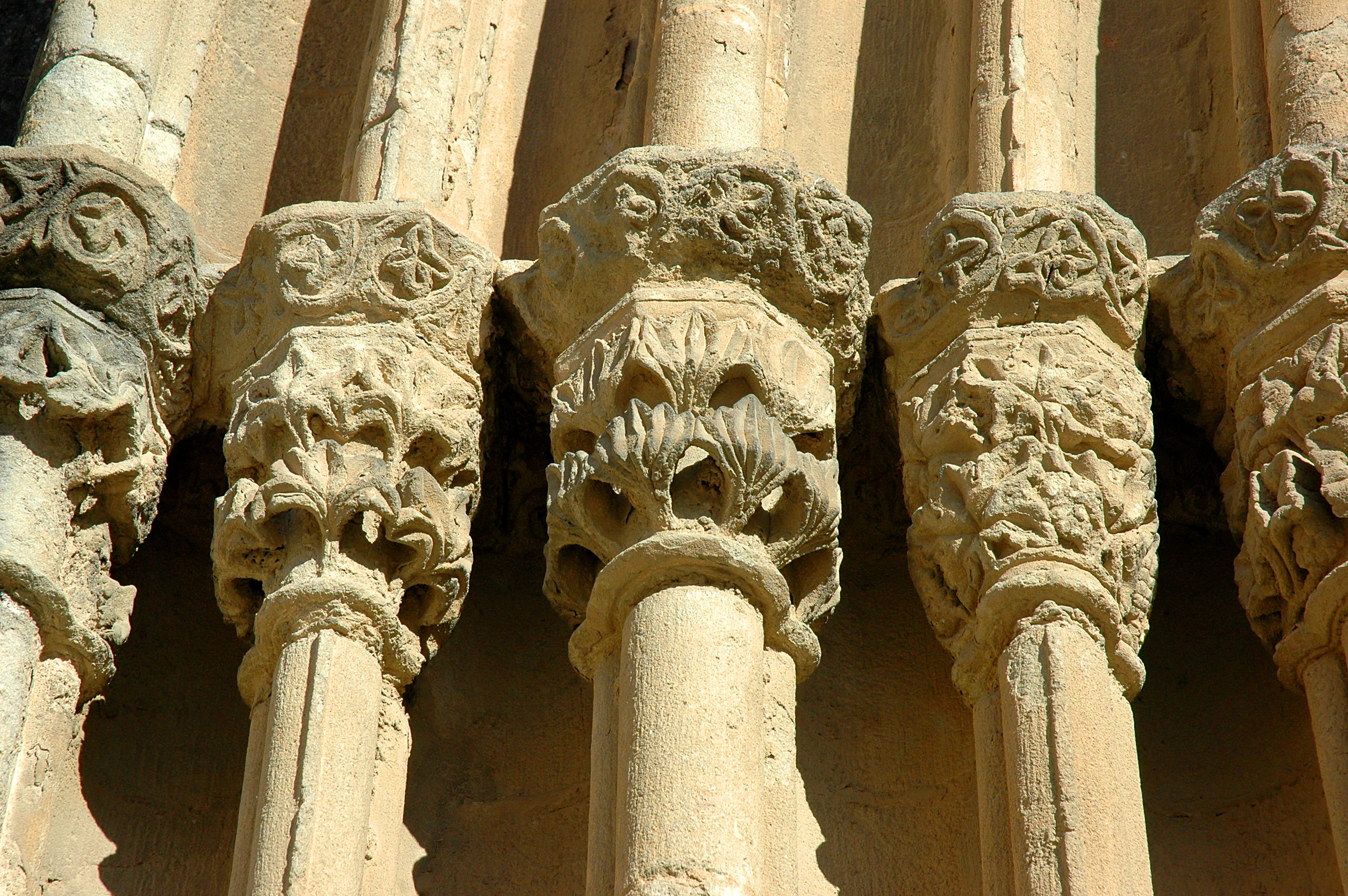 Monestir de Sant Cugat - Portalada - Detall capitells